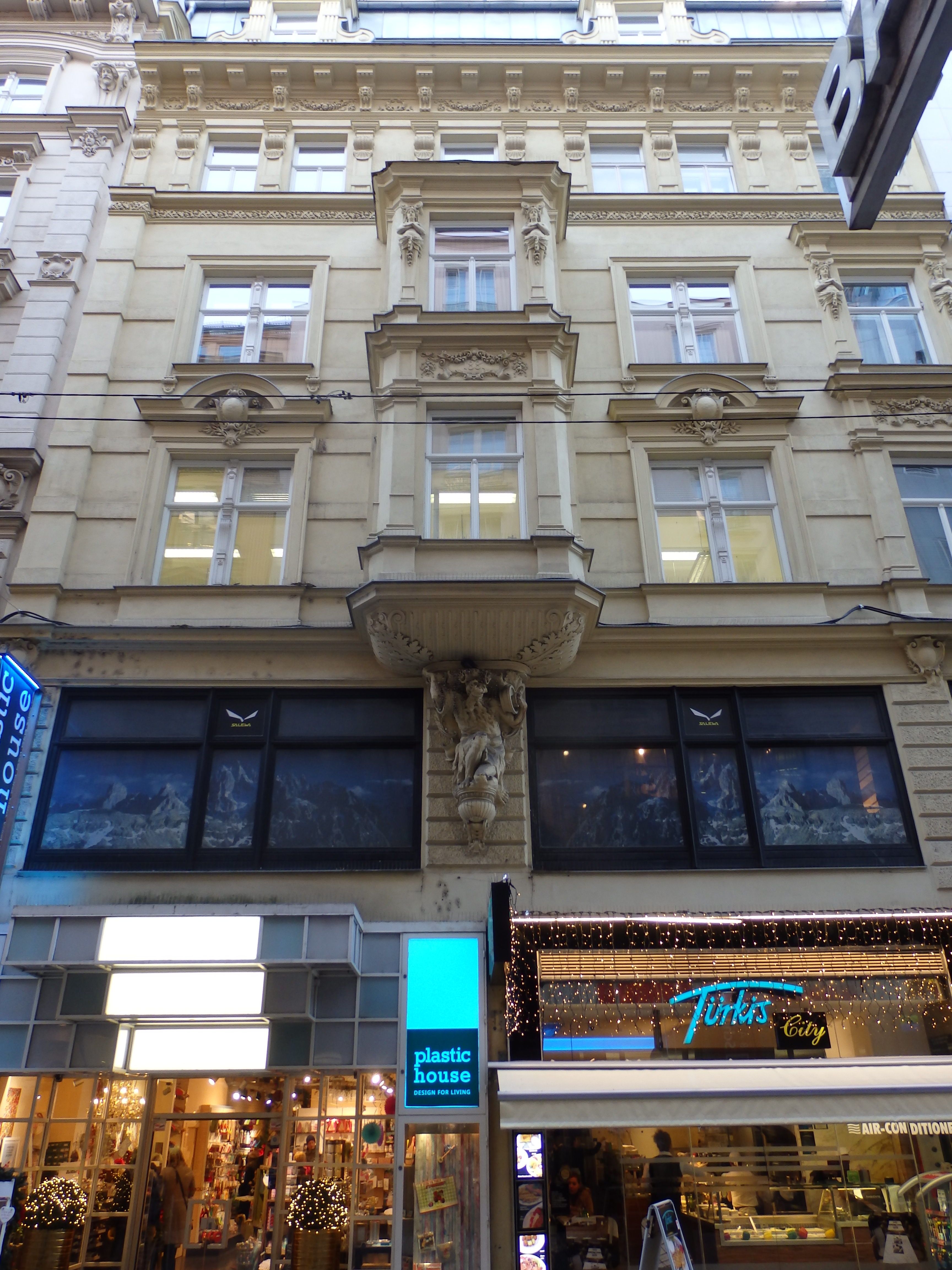 Wohn- und Geschäftshaus (1881) von Hermann Helmer und Ferdinand Fellner, Goldschmiedgasse 4, Wien-Innere Stadt